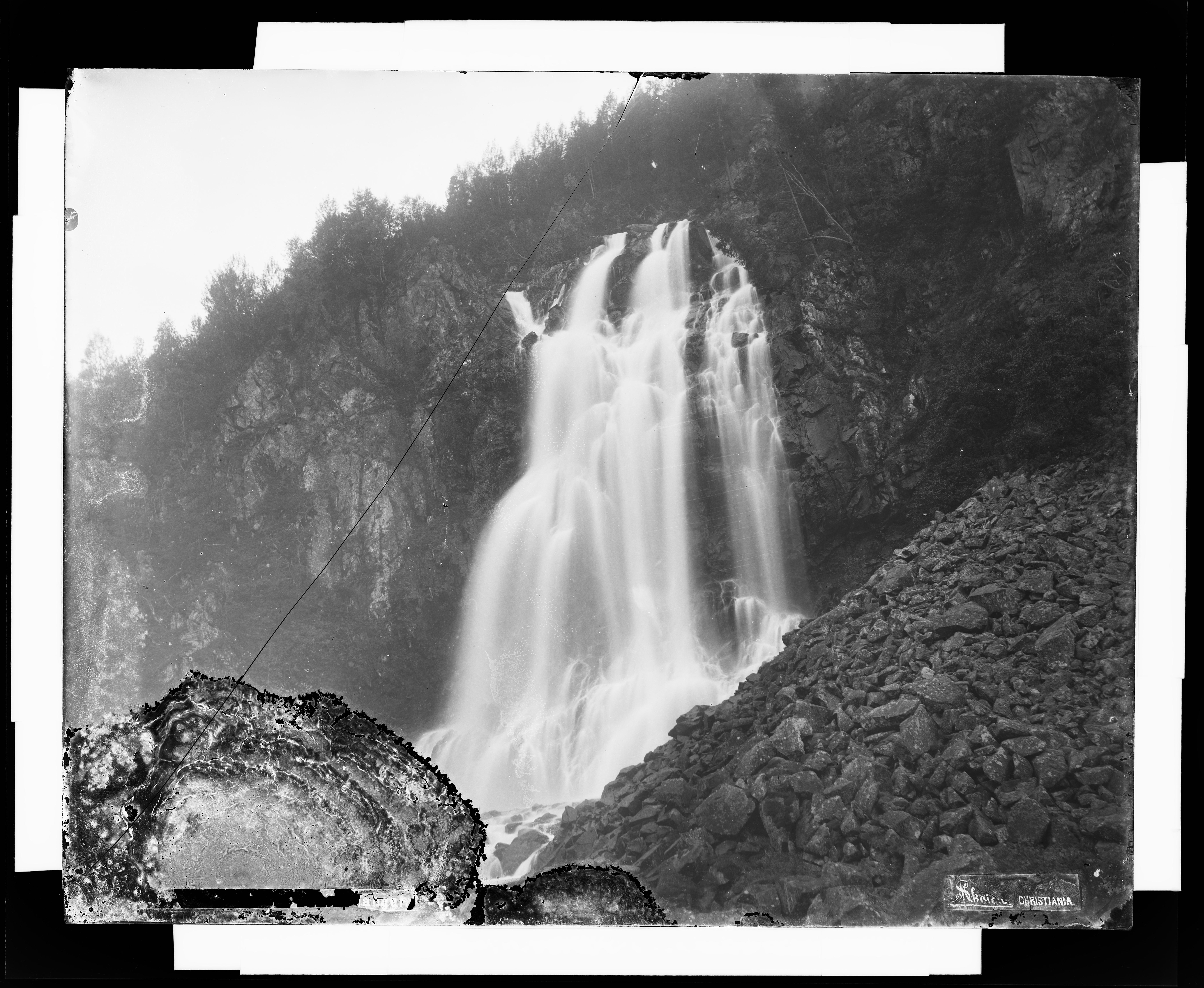 Påskrift negativ: [Uleslig] Skøien Christiania Påskrift konvolutt: Espelandsfossen Hardanger Skøien [Riksantikvaren] Sted: Espelandsfossen,Hardanger Kommune: Odda Fylke: Hordaland Tagger: landskap foss